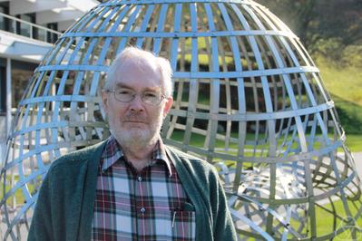 Foto di George A. Elliott